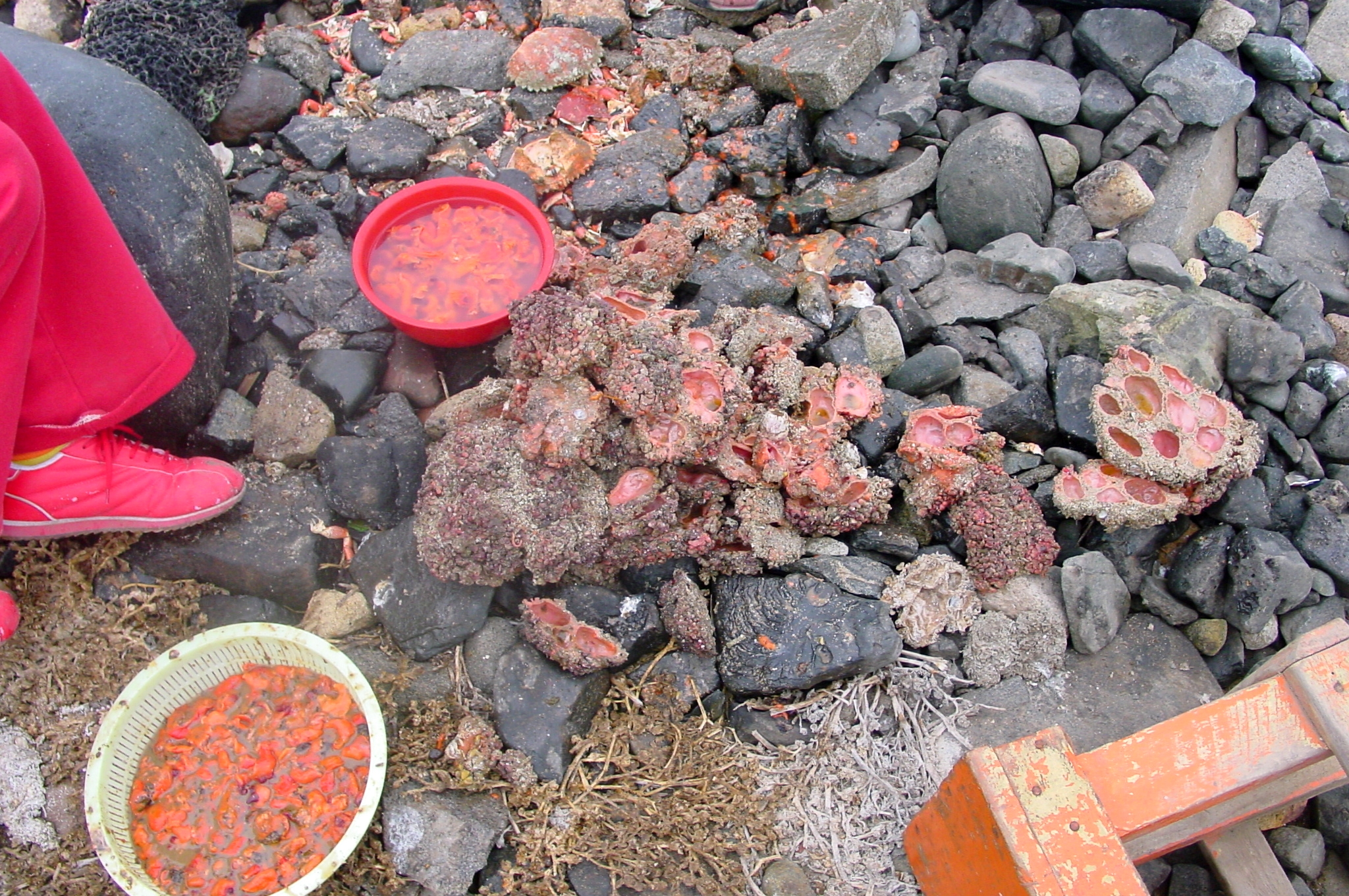 Décorticage des piures (Pyura chilensis Molina) après la pèche, proche de Chungungo, province d'Elqui, région IV, Chili